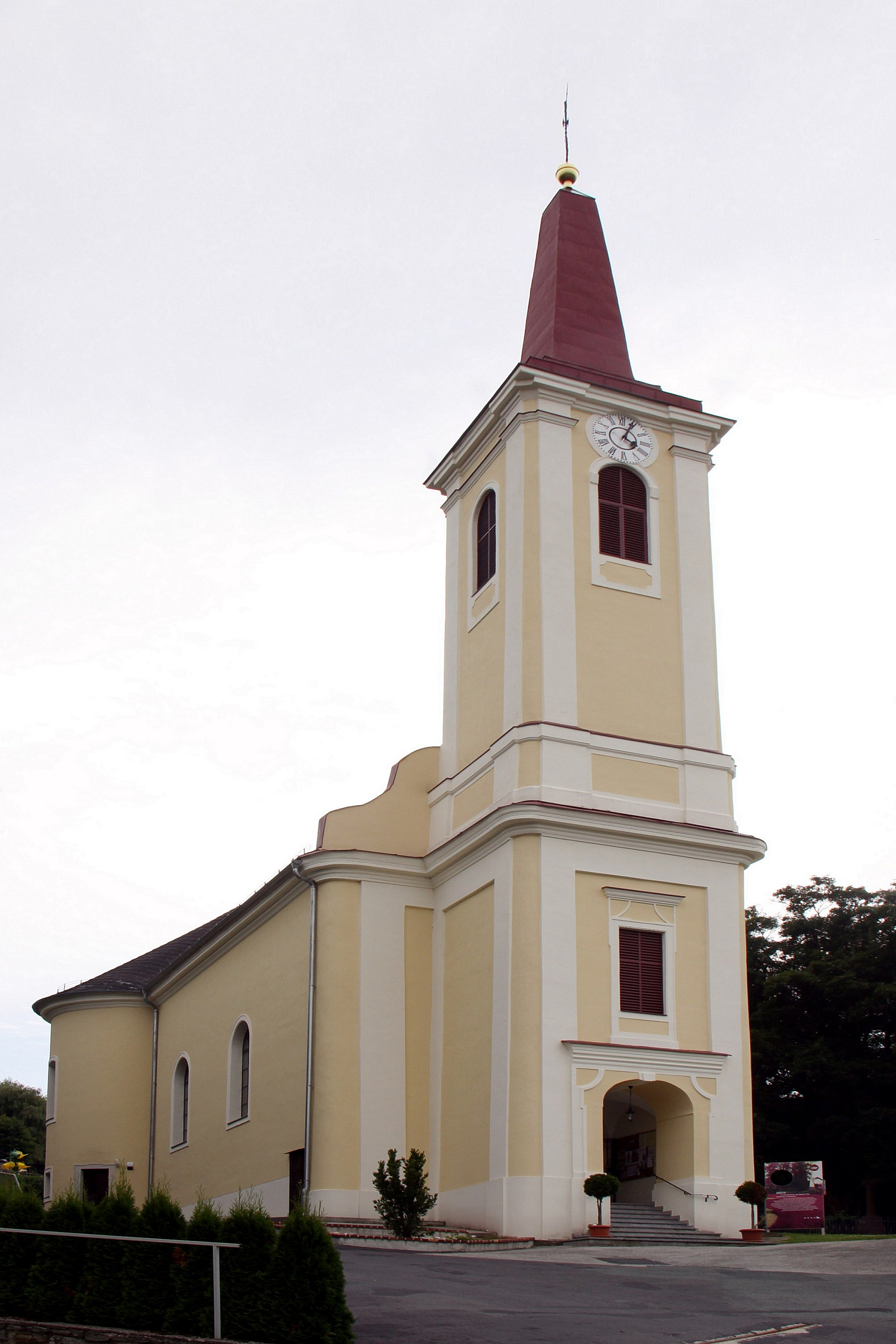 Denkmalgeschützte römisch-katholische Pfarrkirche in Rotenturm an der Pinka Object location47° 15′ 03.99″ N, 16° 14′ 34.65″ E